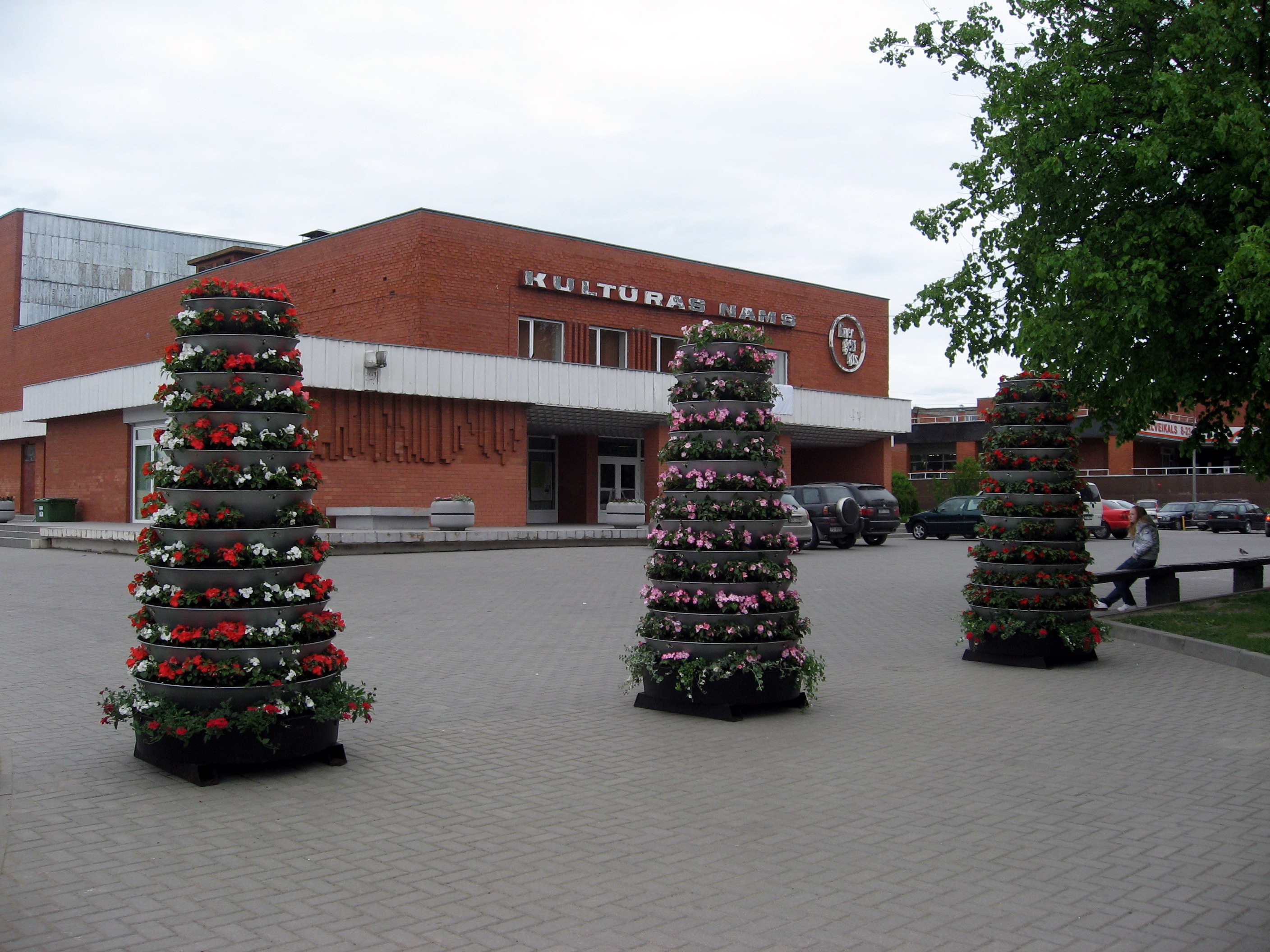 Salaspils, květiny